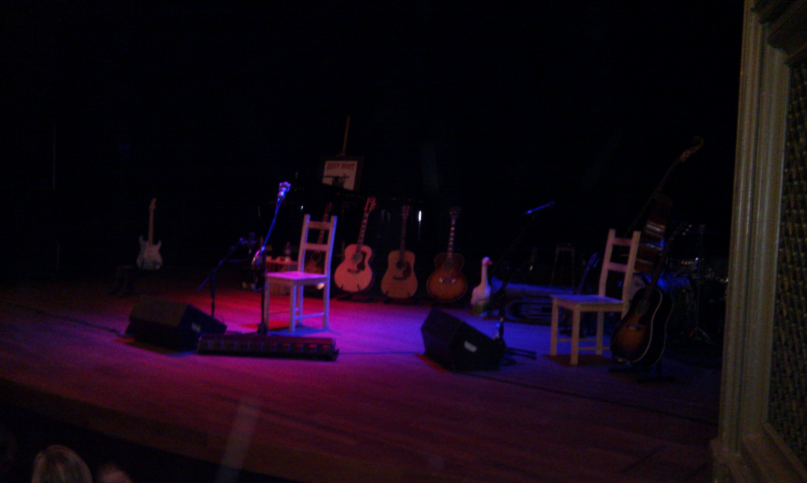 Podiumopstelling van de theatertour 'Hout Moet' van Daniel Lohues in de schouwburg van Leiden op 03-06-2011.